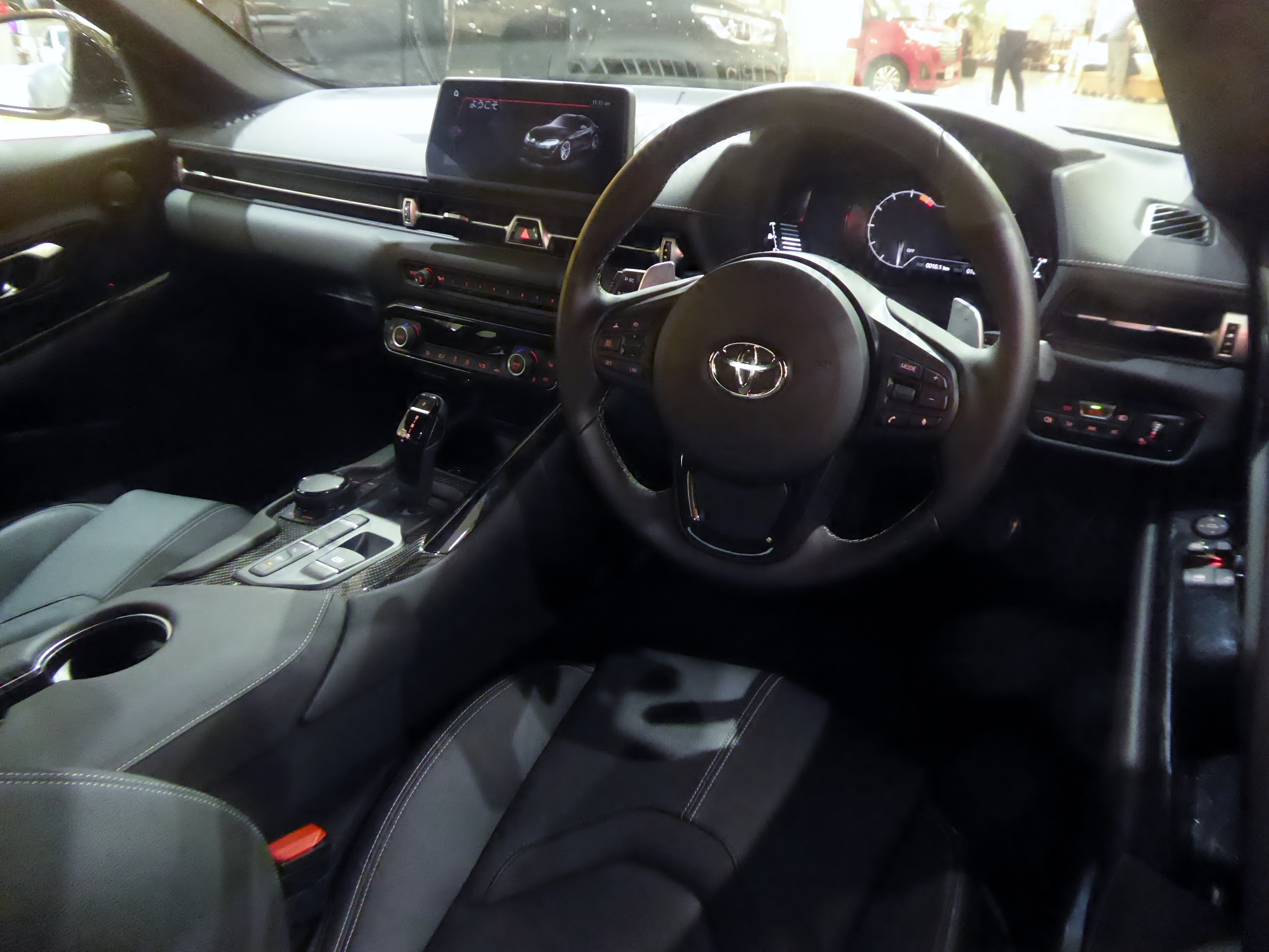 3BA-DB42-ZRRW型トヨタ・GRスープラRZのインテリアを撮影。